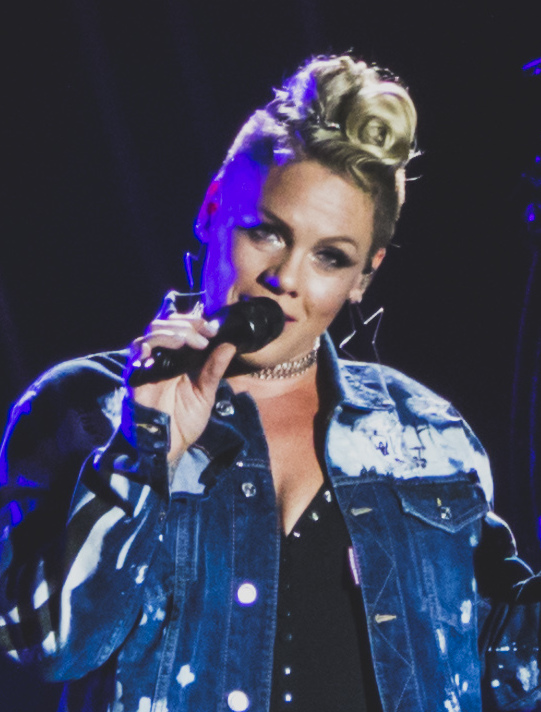 PinkVFest190817-35